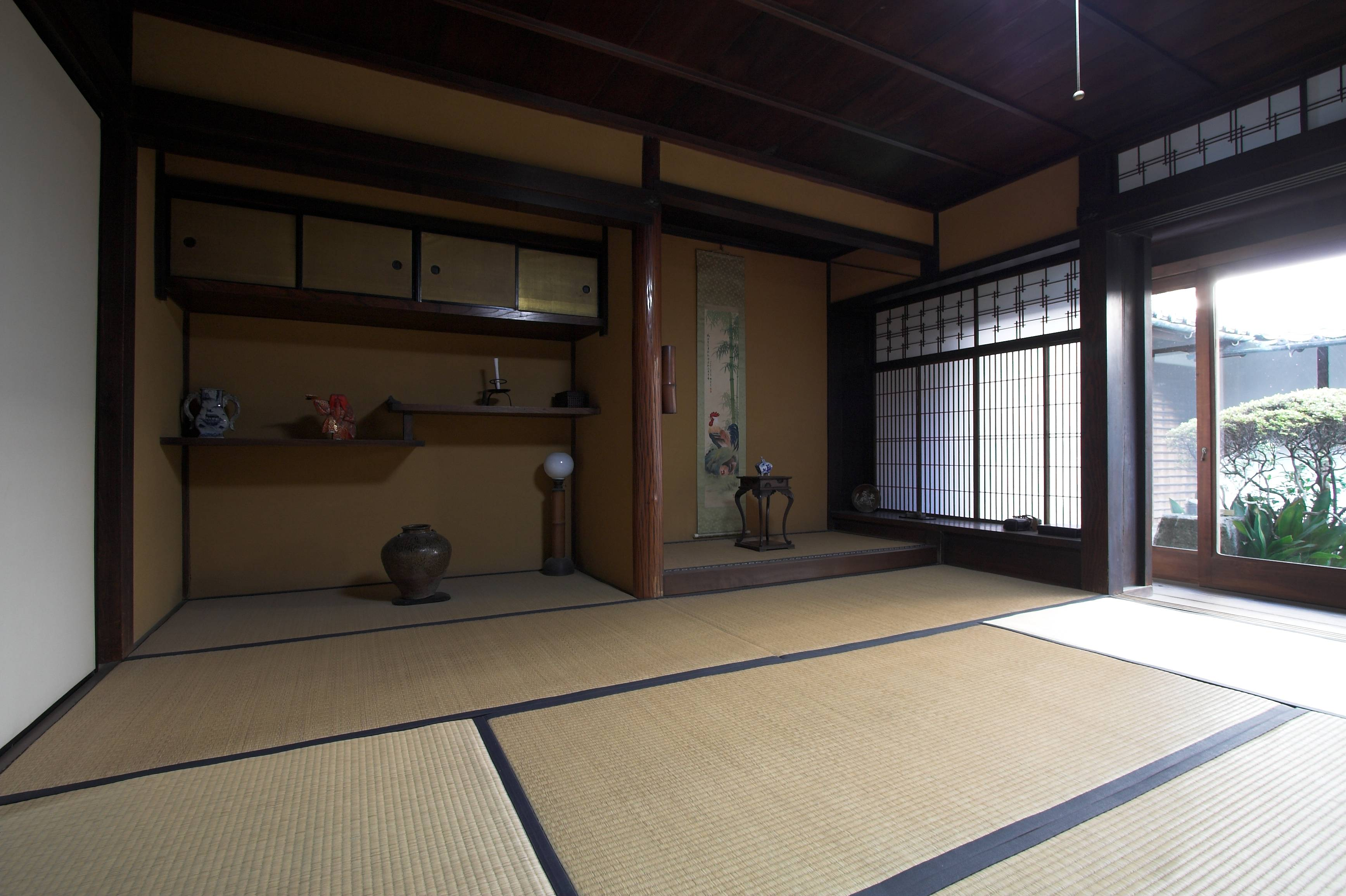 高木家住宅(奈良県橿原市, Japan)